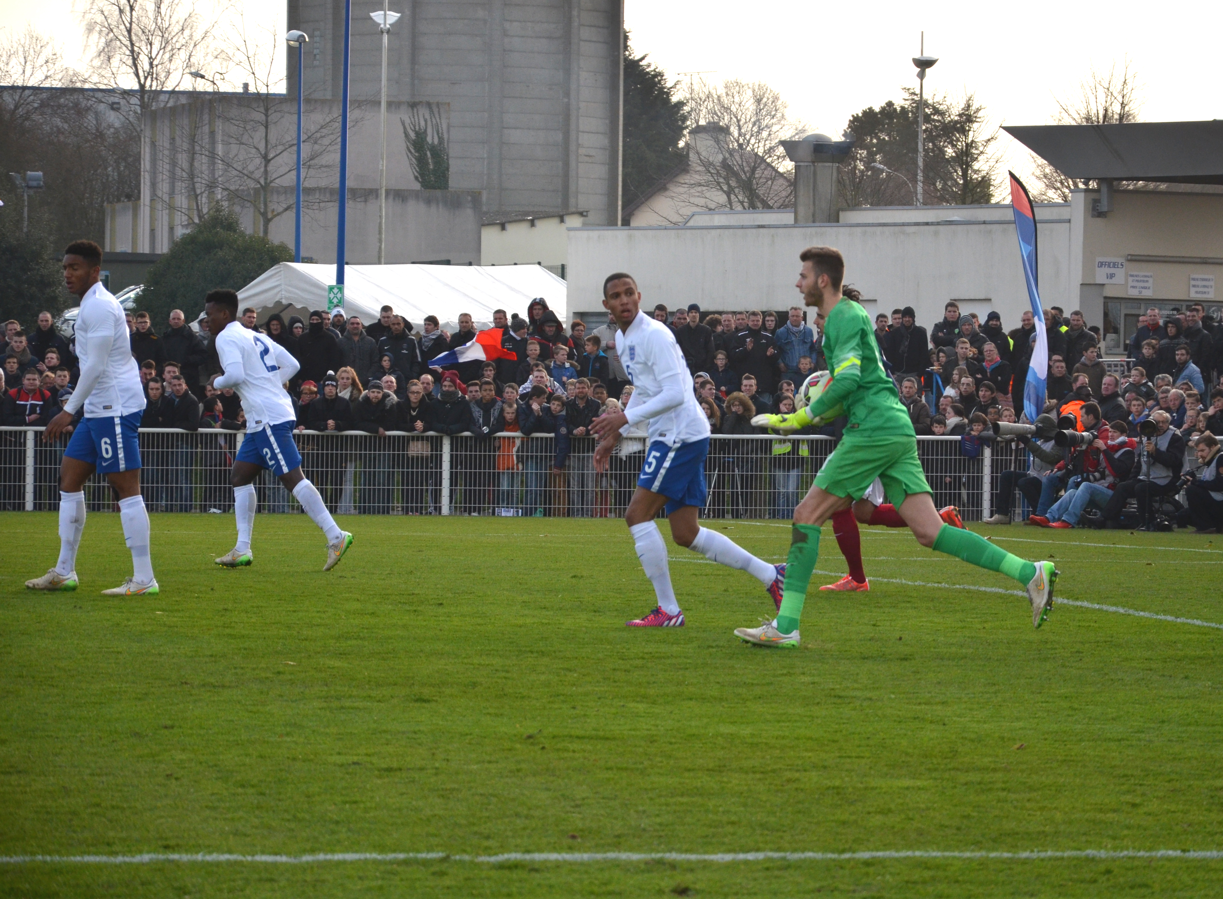 Photographie prise lors du match opposant la France à l'Angleterre pour les qualifications du championnat d'Europe de football des moins de 19 ans 2015 au stade Louis-Villemer de Saint-Lô le 31 mars 2015. Ici, dégagement de la défense anglaise, avec le ballon dans les mains d'Angus Gunn.